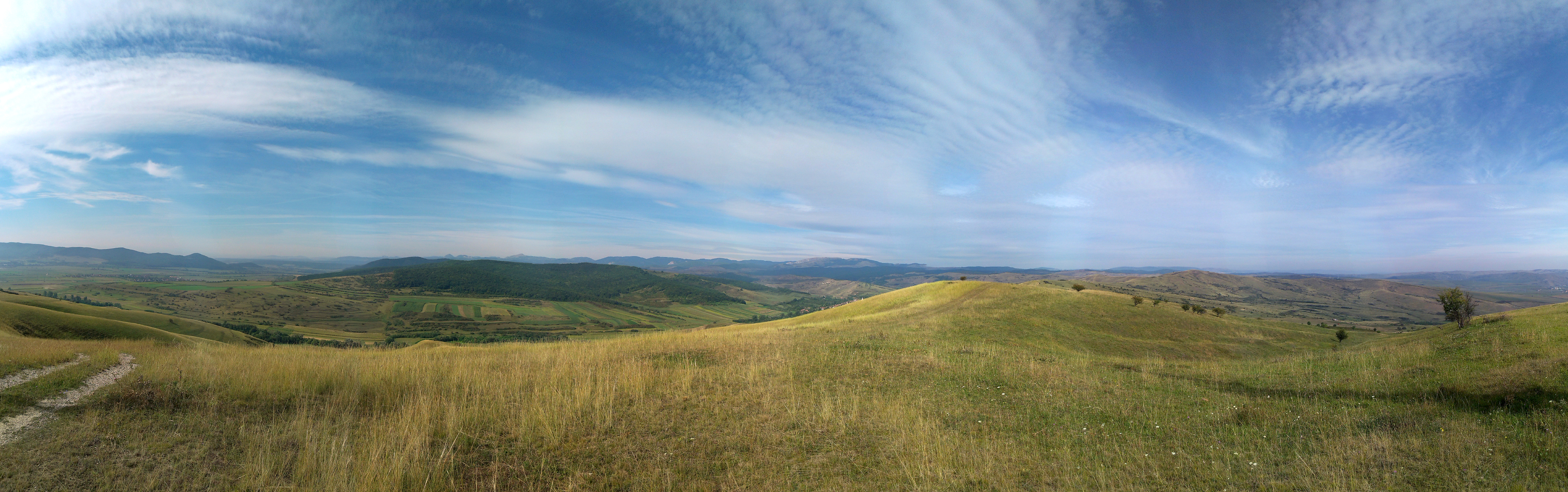 Aranyosszék látképe a Felvinci Cserehegyről.